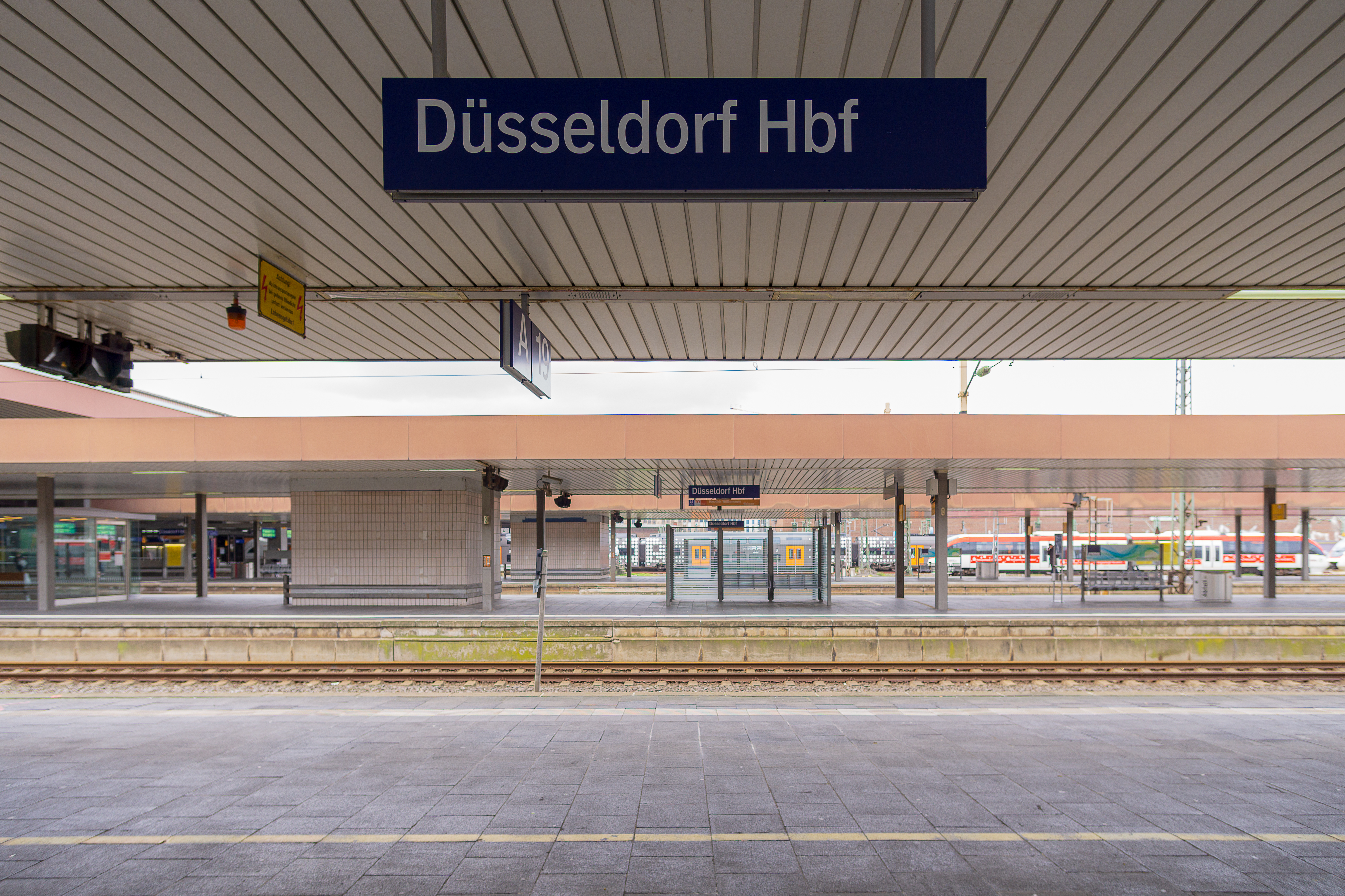 Bahnhofsschild am Bahnsteig Düsseldorf Hbf